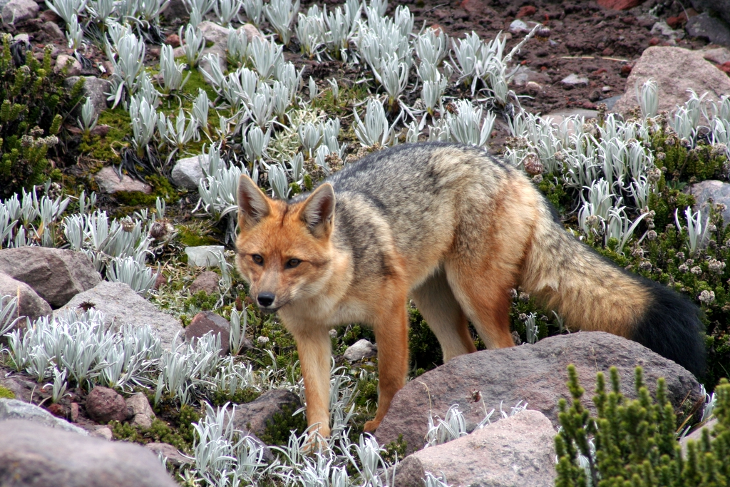 Andenfuchs, beobachtet in Ecuador im Nationalpark Cotopaxi in ca. 5.000 Metern Höhe